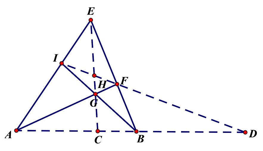 中文（中国大陆）: 完全四边形及三条对角线。